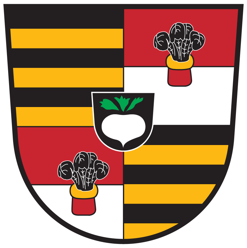 Wappen von Kutschach am See